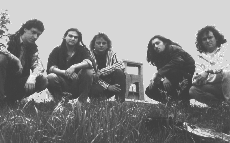 Xenon